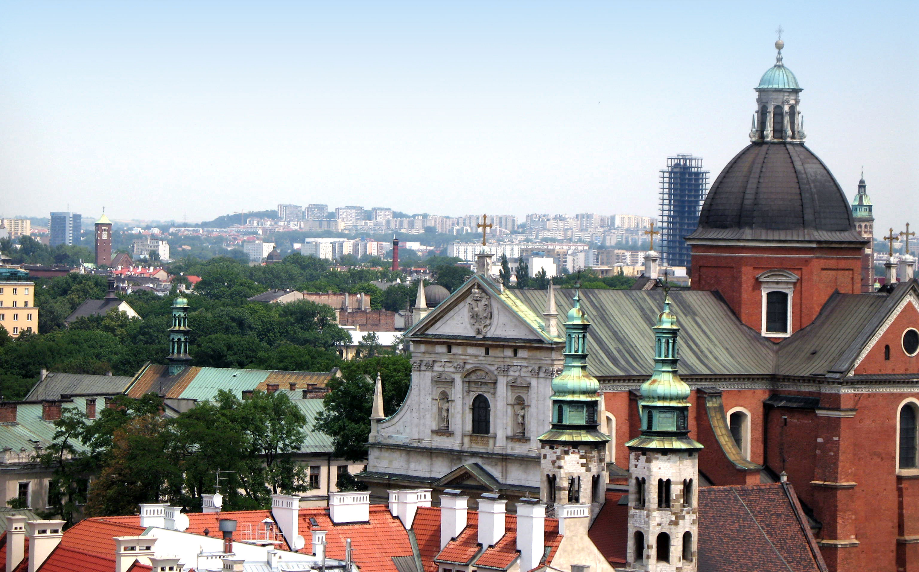 Wawel in Kraków, Poland